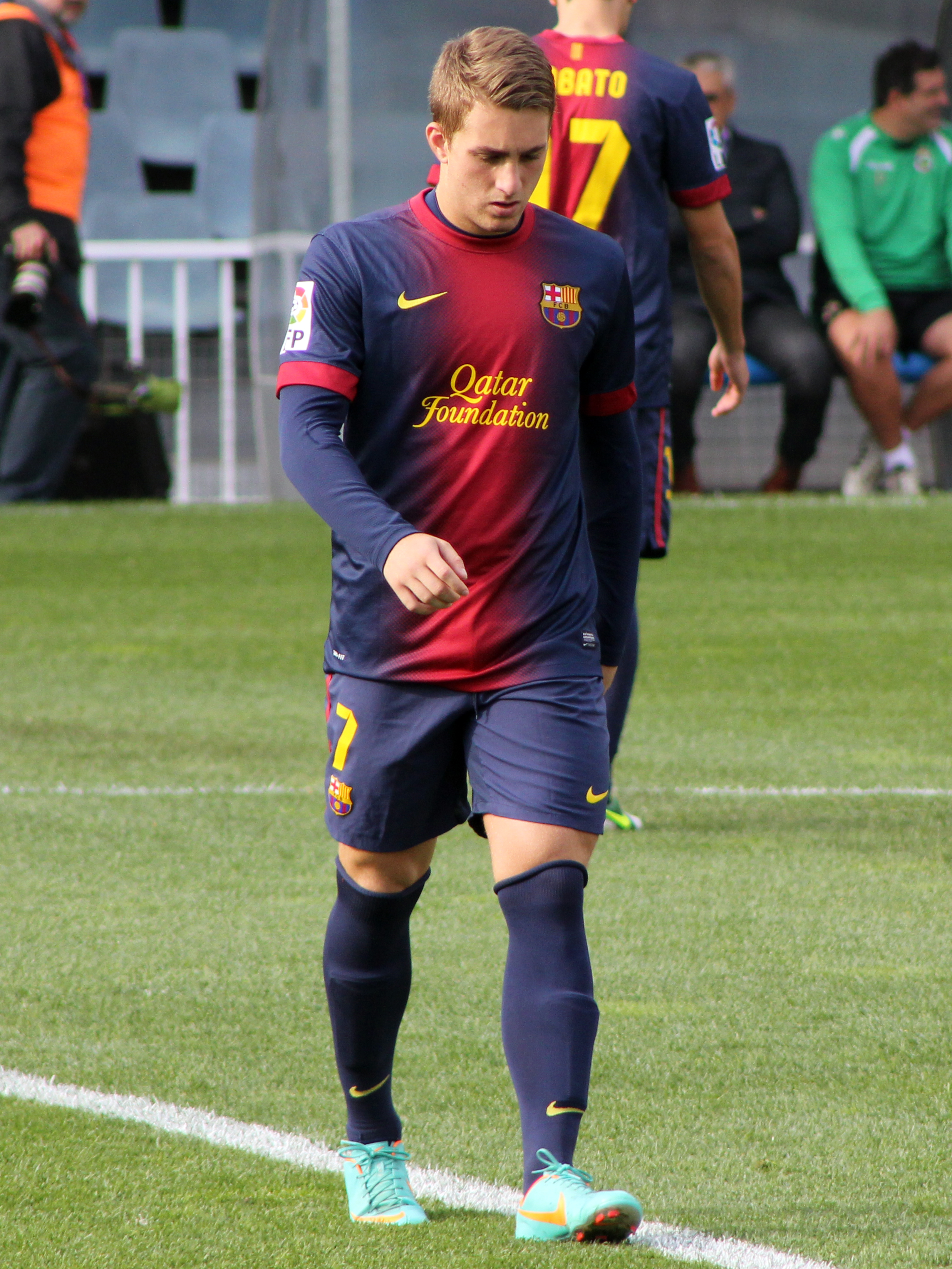 Foto realizada por Javier Segura (@castroquini en Twitter)